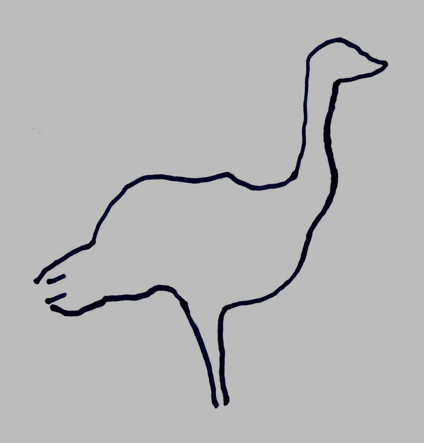 Gravure préhistorique de Hadjrat Sidi Boubaker, région de Djelfa, Algérie, croquis schématique (autruche)